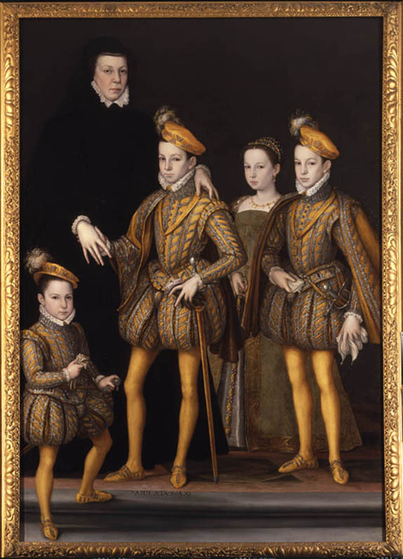 Caterina de' Medici con il figlio re Carlo IX, Margherita detta "Margot", Enrico duca d'Angiò e Francesco Ercole duca d'Alençon.